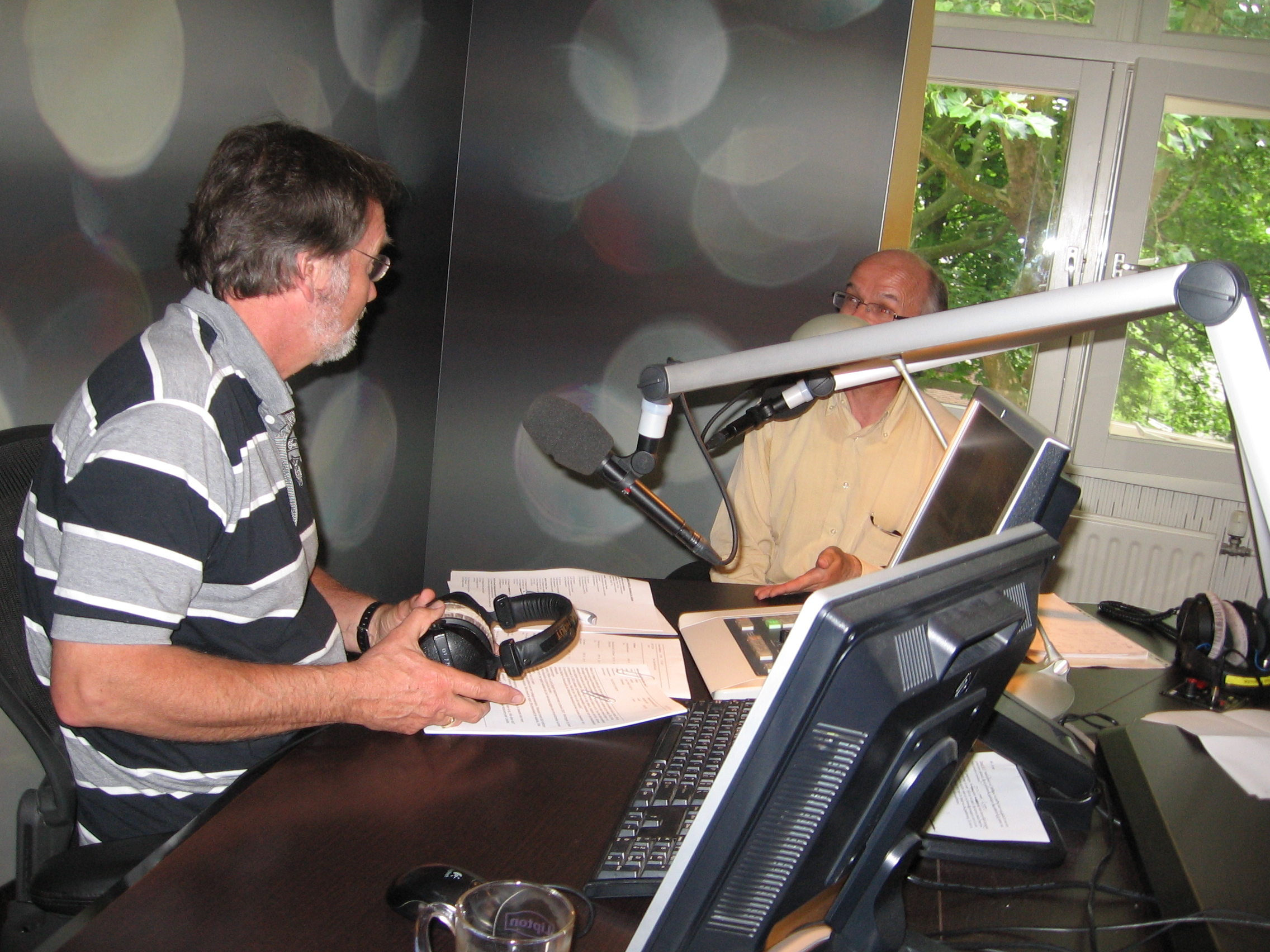 Peter van den Hout (Radio Gelderland) interviewt Hans Muller over wikipedia, studio Radio Gelderland, Arnhem.